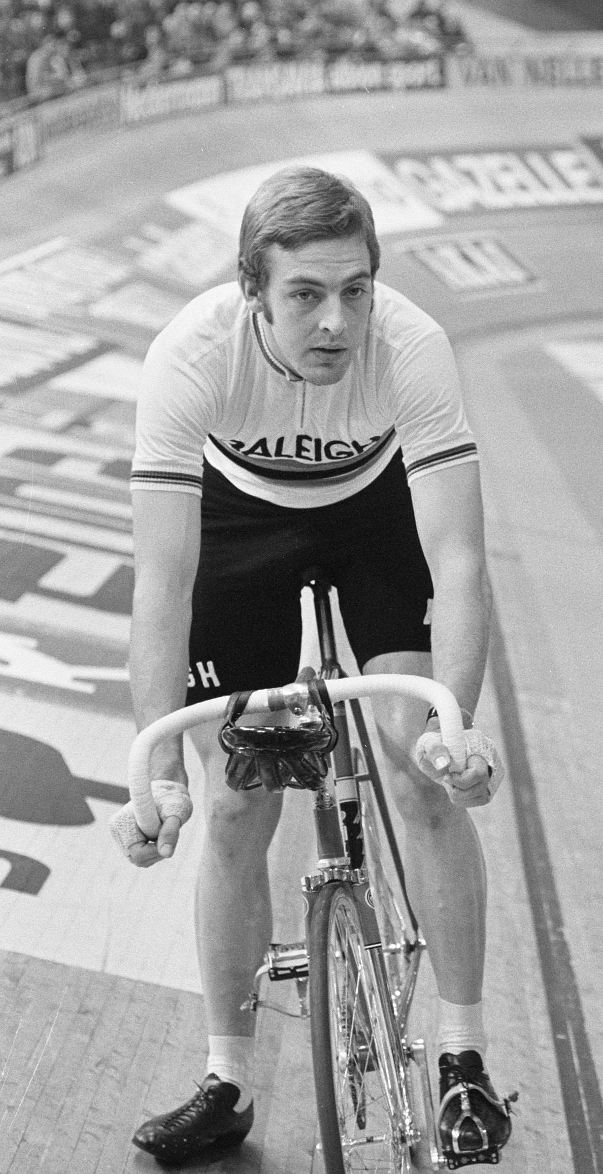 Wielerzesdaagse in Ahoyhal, Rotterdam; wielrenner Roy Schuiten